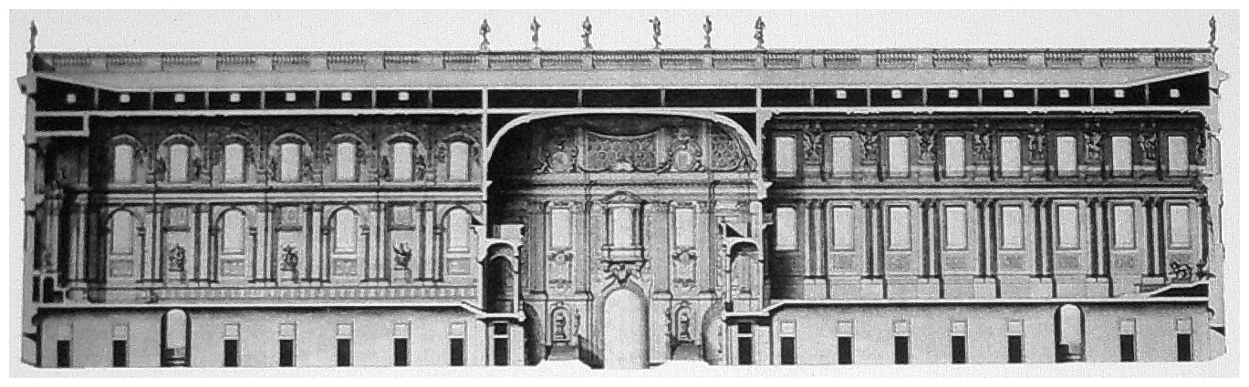 Stockholms slott, längssektion genom södra längan med Rikssalen till höger och Slottskyrkan till vänster